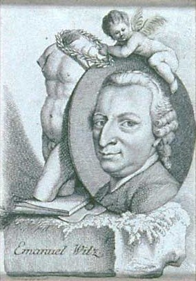 Swiss painter Emanuel Witz (1717-1797)